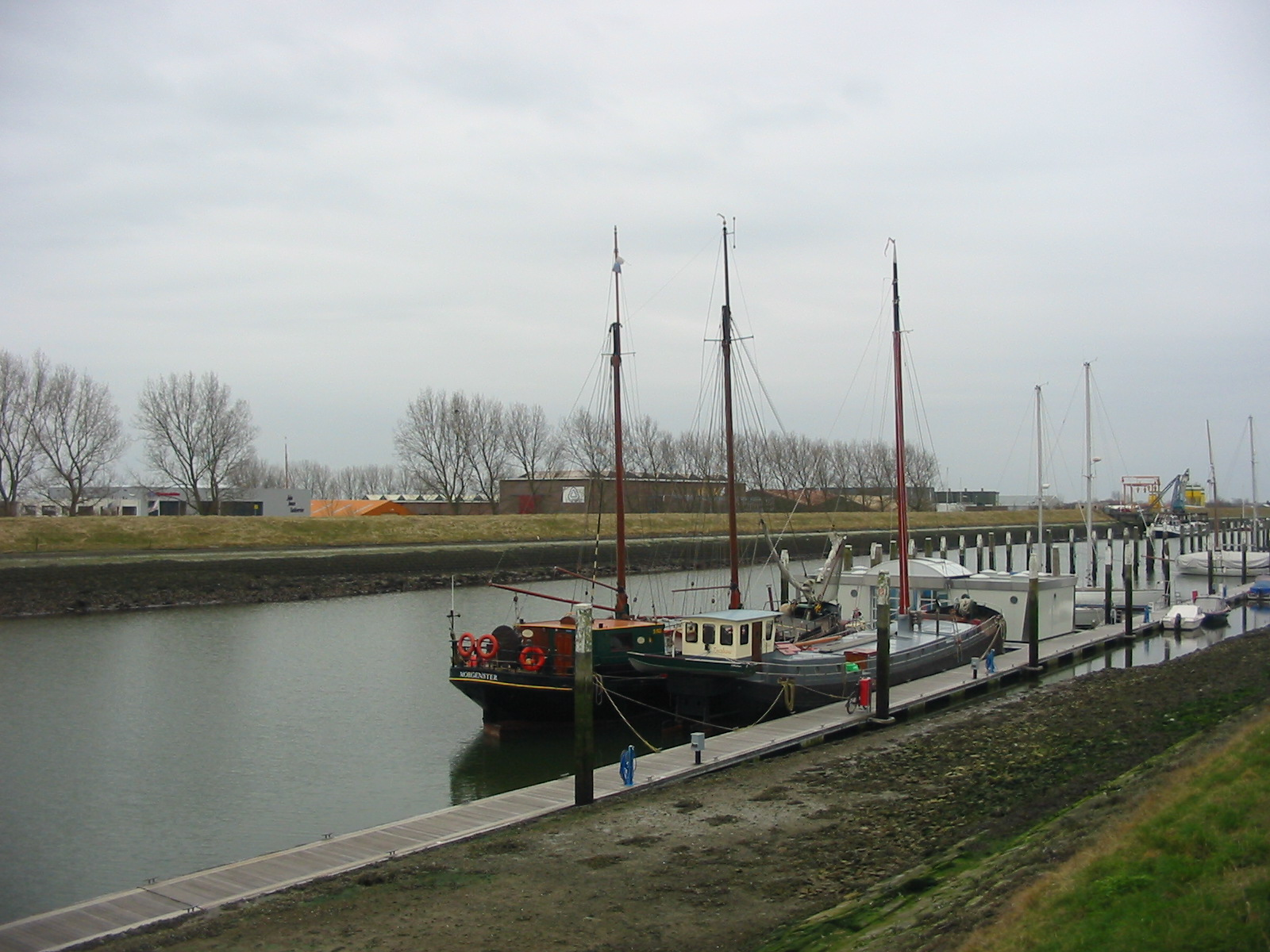 Channel, Zierikzee, Netherlands